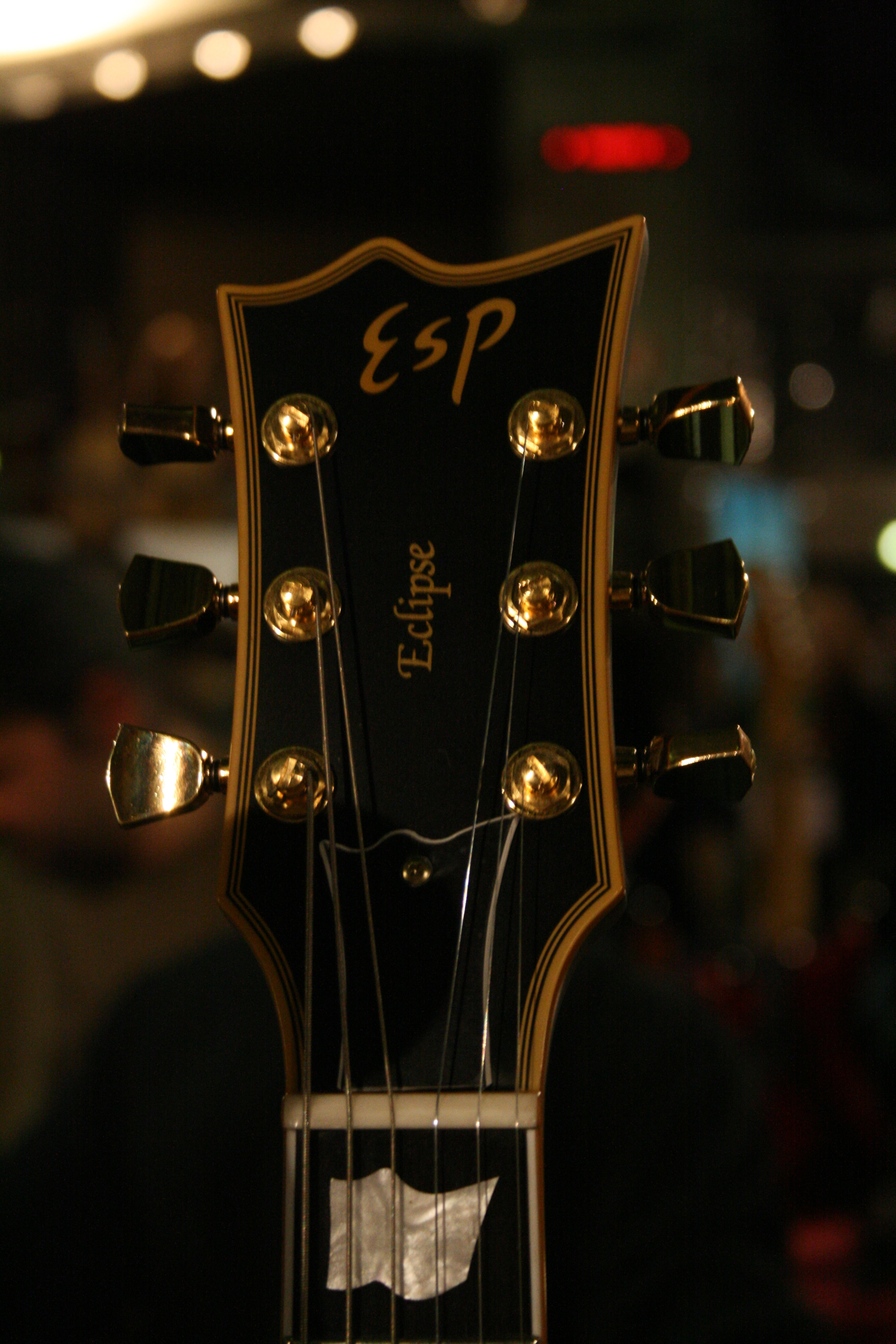 ESP guitar